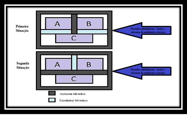 Na primeira situação, os blocos A e B estão isolados termicamente, ou seja, não há troca de calor entre eles. Entretanto ambos podem trocar energia na forma de calor com o bloco C. Essa troca se dá enquanto os blocos não estiverem em equilíbrio térmico. Na segunda situação, a parede isolante está separando o bloco C dos outros. Embora haja uma parede de material condutor entre A e B, não ocorre troca de calor. Isso é explicado pela Lei Zero da Termodinâmica que afirma que se A e B estão em equilíbrio térmico com C, então A e B estão em equilíbrio térmico entre si.